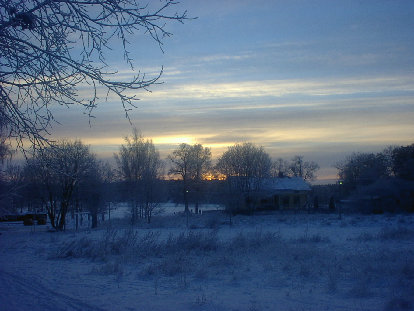 Arbrå, Sweden